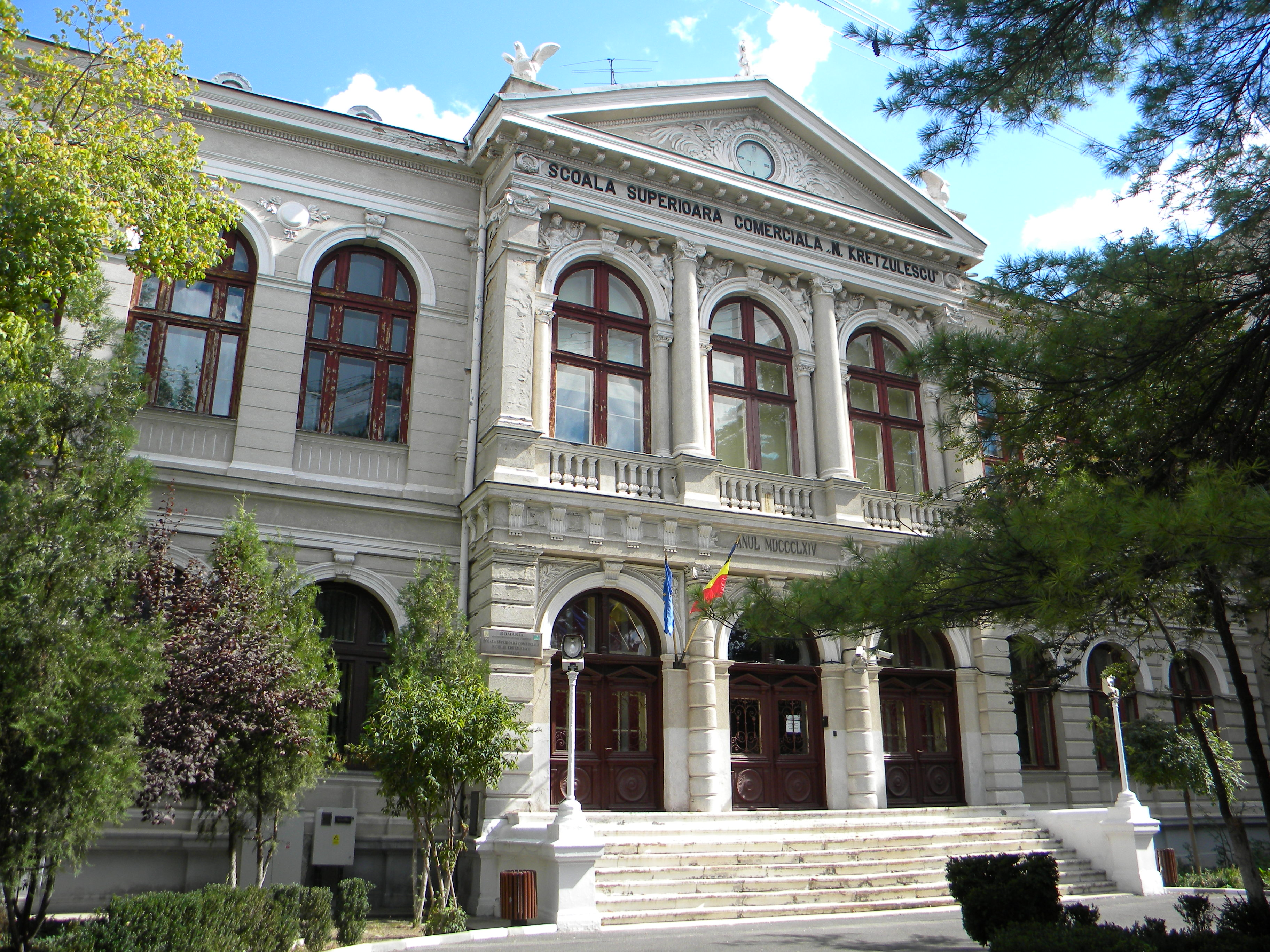 Bucuresti, Romania, Str. Hristo Botev nr. 17-19 (Scoala Comerciala N. Kretulescu (fatada)); arhitect: P. Petricu